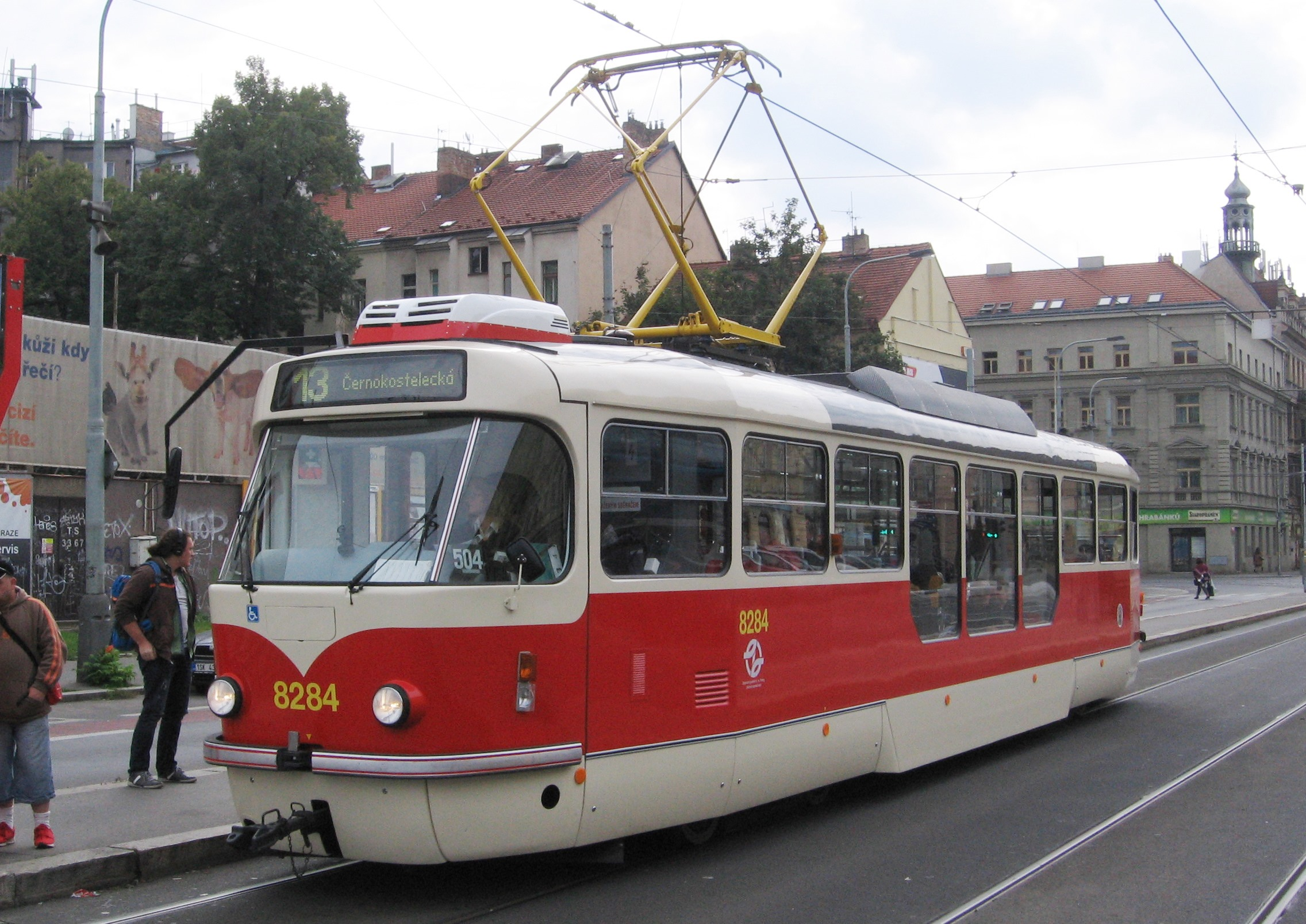 Vůz 8284 v zastávce Otakarova